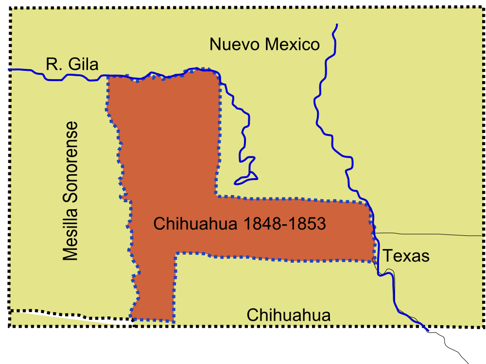 Mesilla Chihuahua Map